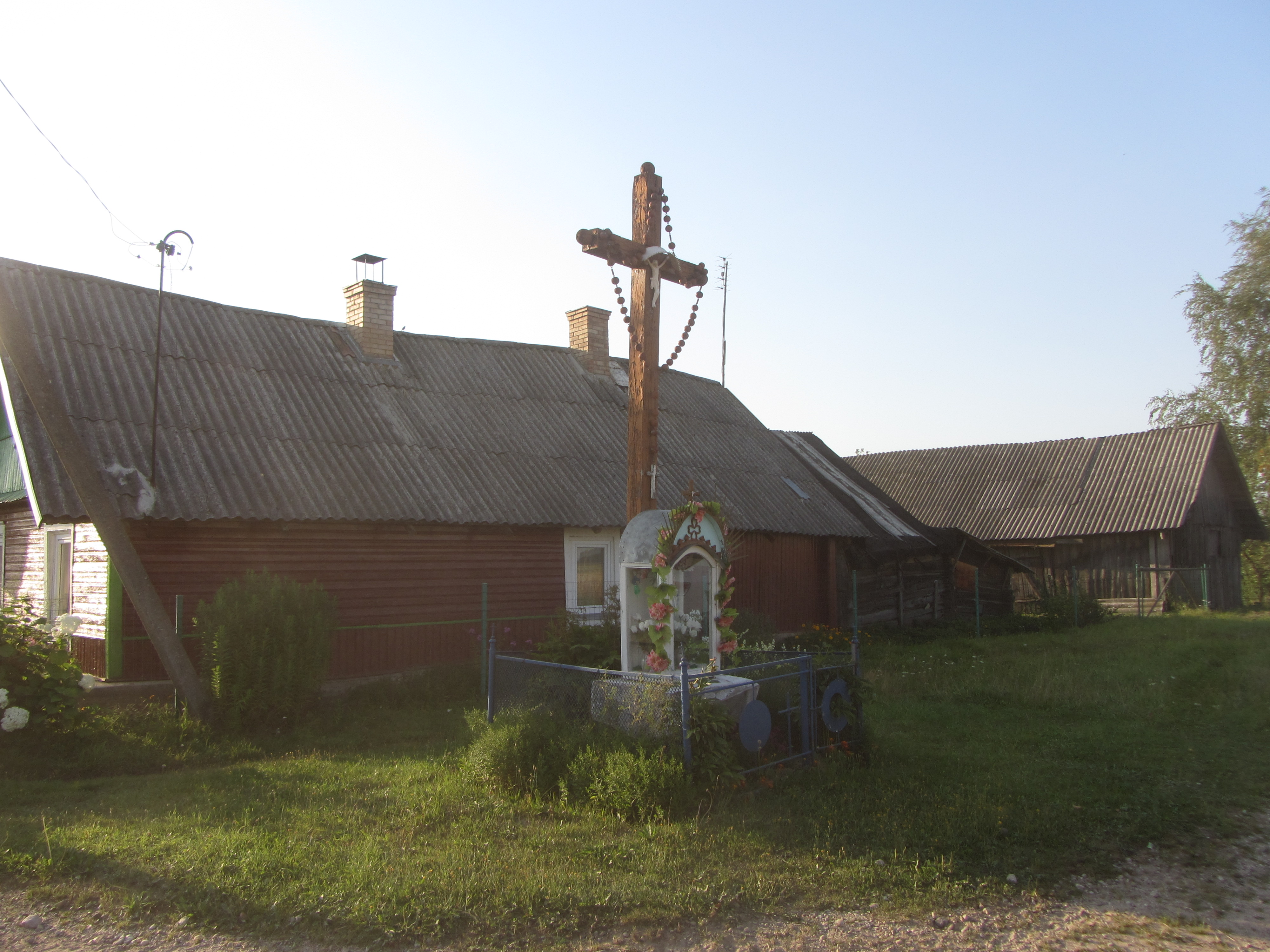 Valakininkai, Lithuania